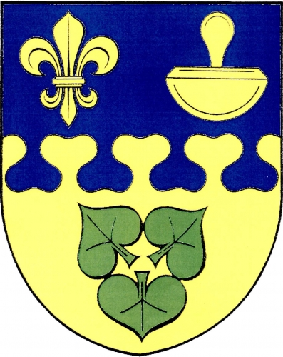 znak, Hodíškov, okres Žďár nad Sázavou